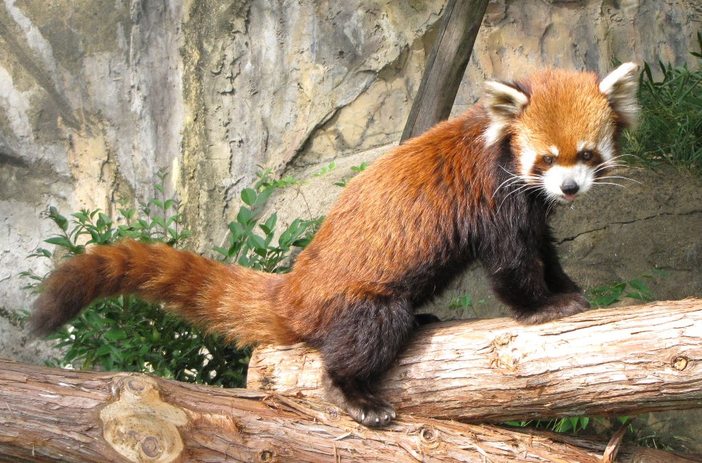 野毛山動物園（横浜市）のレッサーパンダ